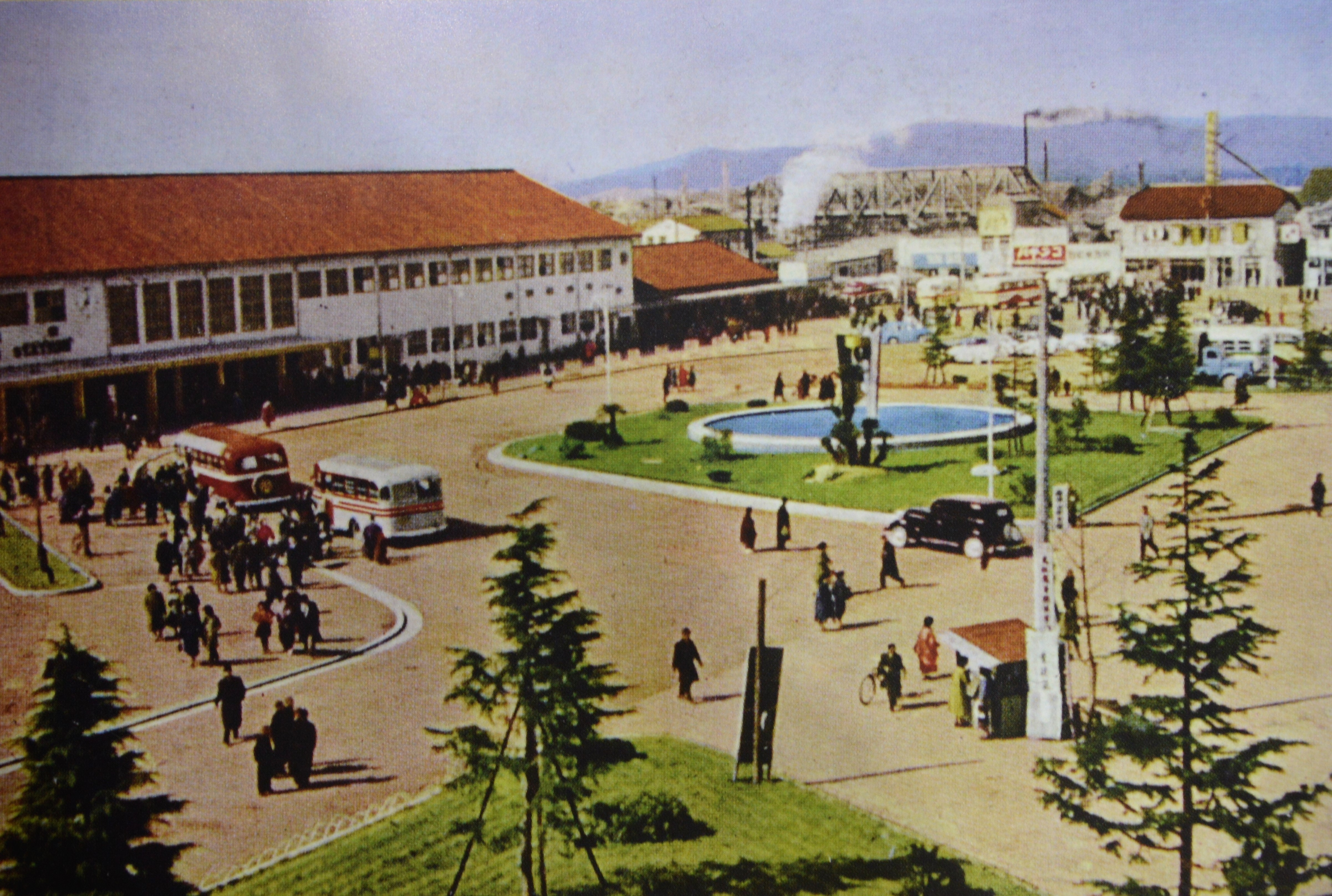 国鉄豊橋駅前。1950年完成。豊橋市美術博物館所蔵の